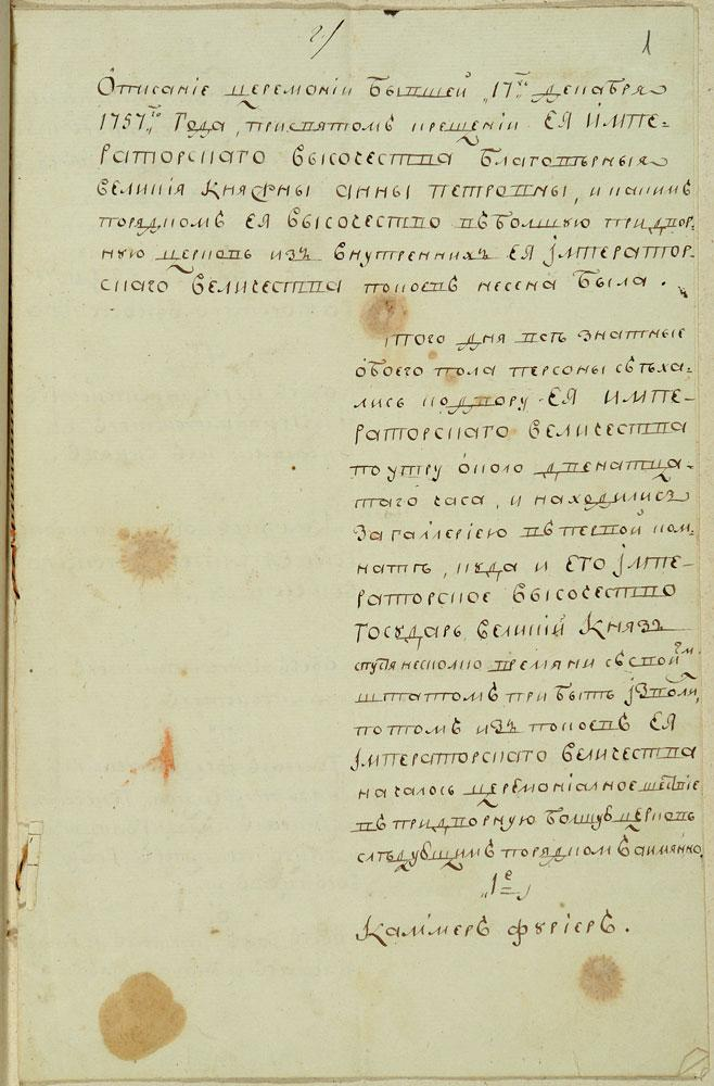 Описание церемонии крещения великой княжны Анны Петровны РГАДА. Ф. 156. Исторические и церемониальные дела. Д. 33. Л. 1–2. Подлинник. В составе МГАМИД.